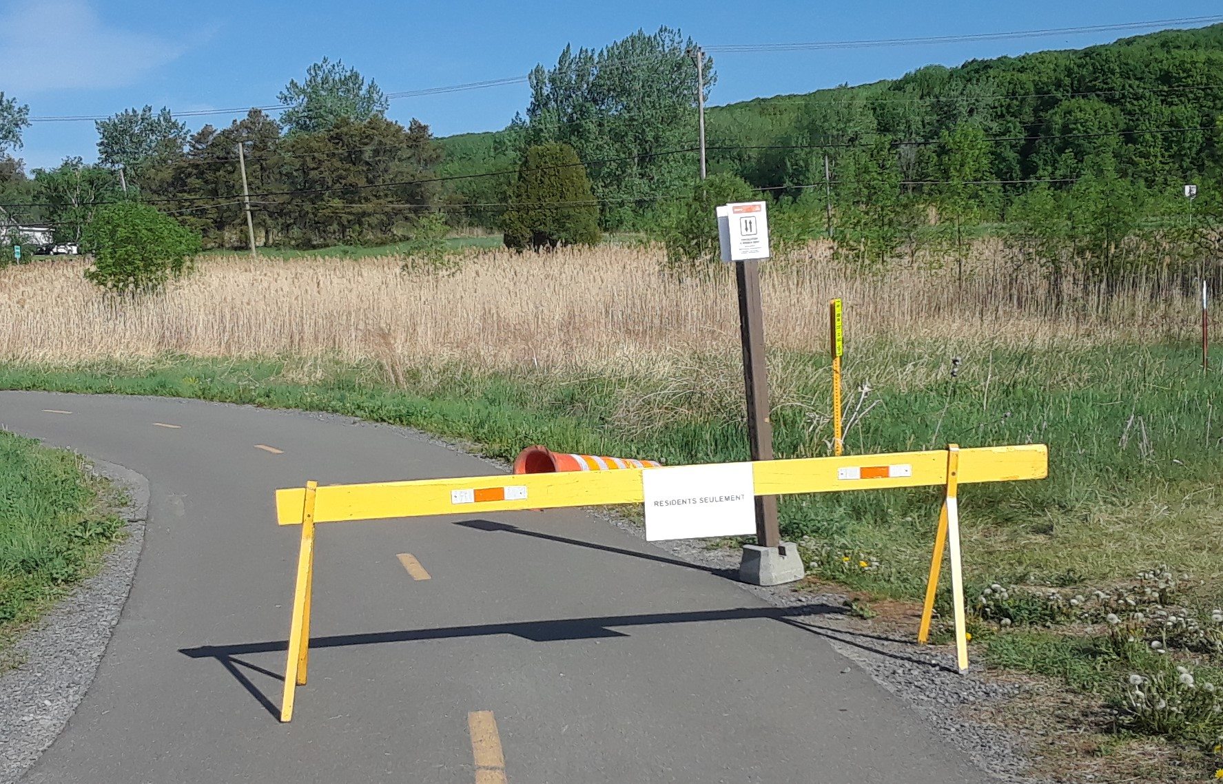 Barrière sur la piste cyclable d'Oka en temps de pandémie de Covid-19 au Québec. La piste cyclable vers le village d’Oka est restreinte pour les résidents seulement.